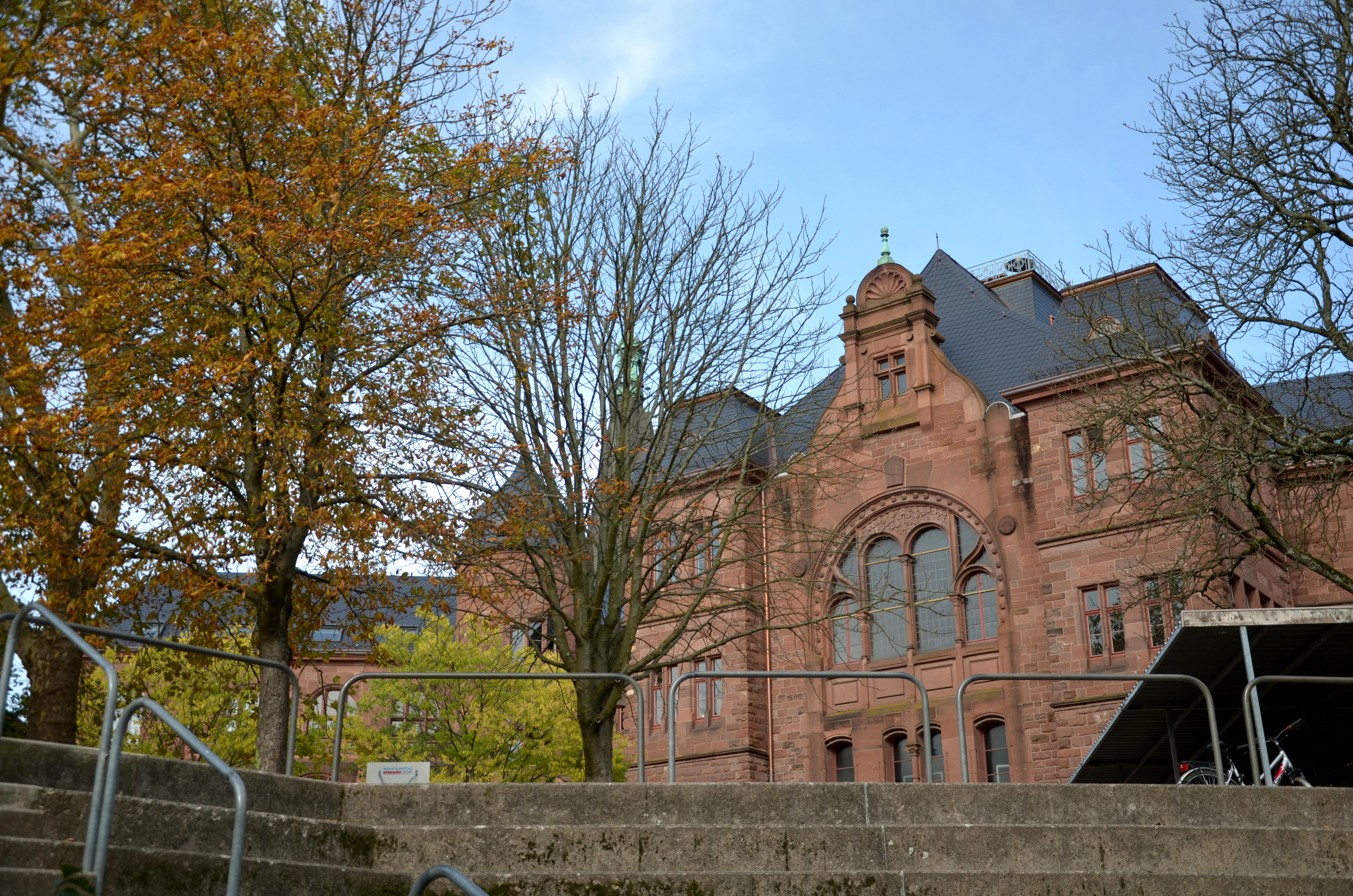 Fotografie Friedrich-Gymnasium Freiburg (im Breisgau) [FG] im Stadtteil Herdern